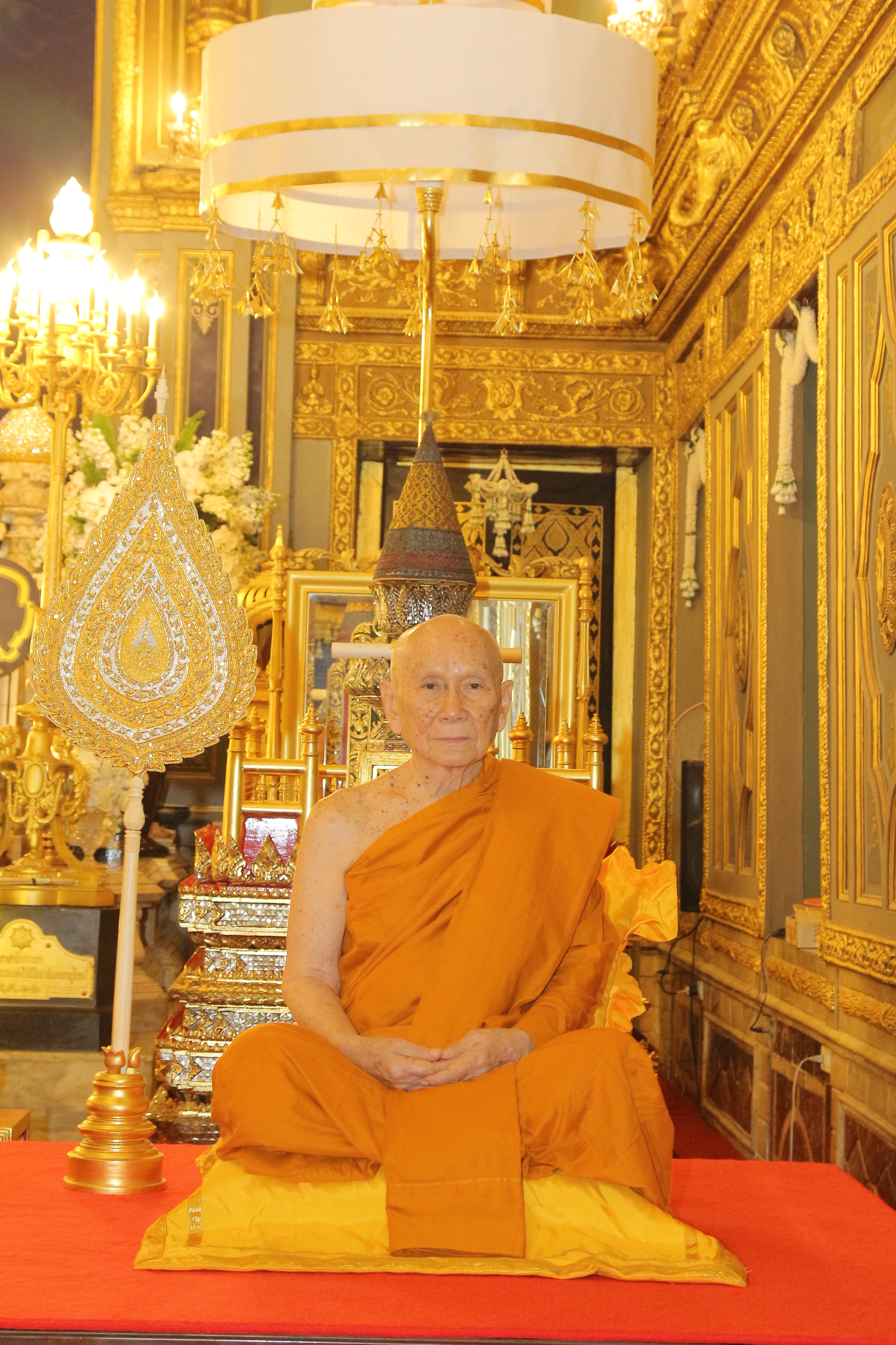 สมเด็จพระอริยวงศาคตญาณ สมเด็จพระสังฆราช (อัมพร อมฺพโร)